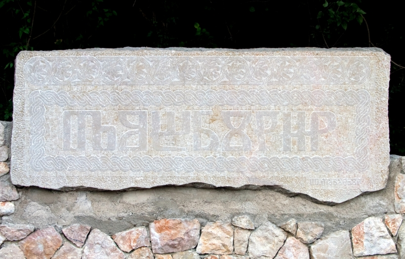 Glagoljski natpis na ulazu u Dobrinj na otoku Krku